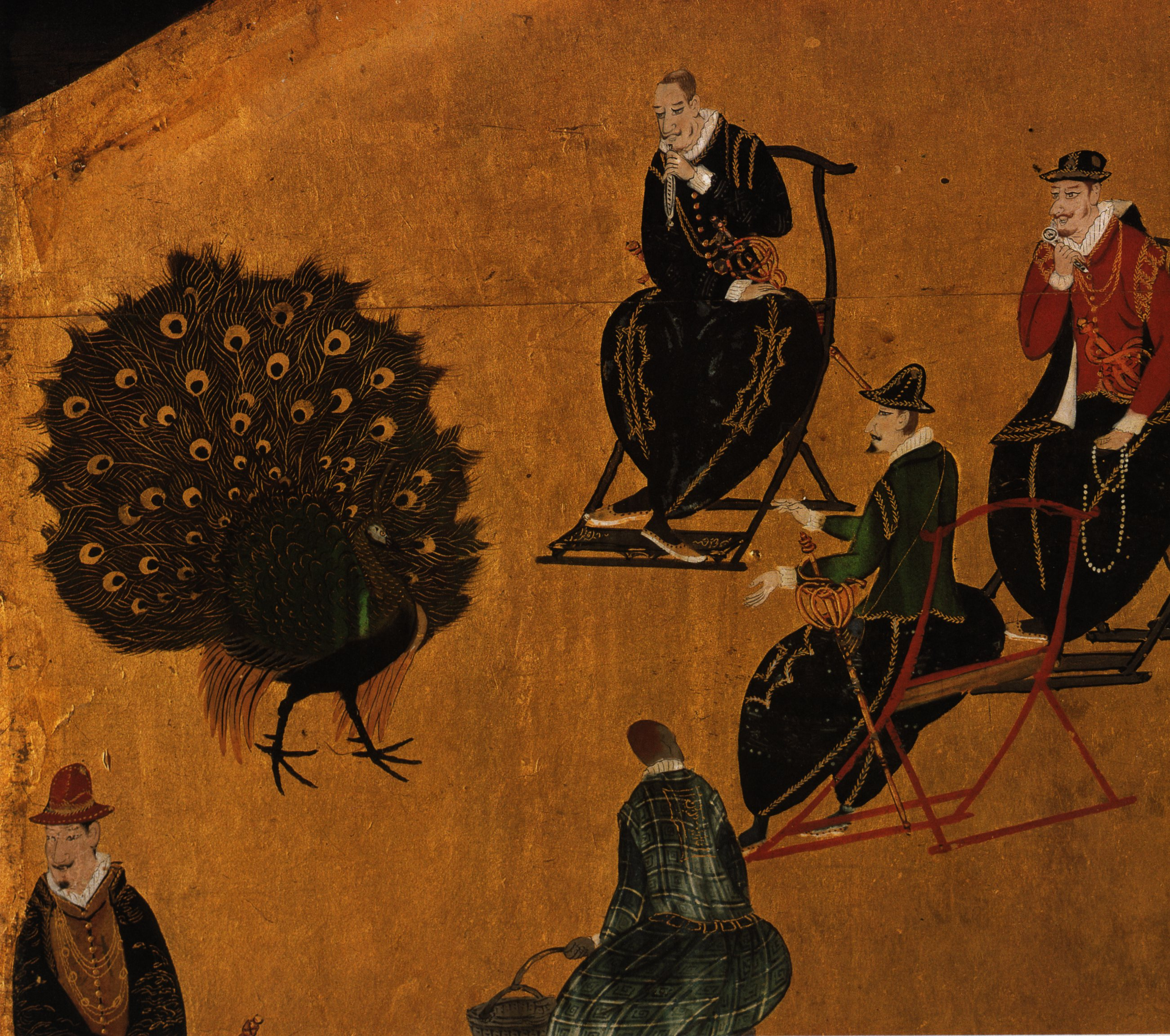 "Namban" art panels detail